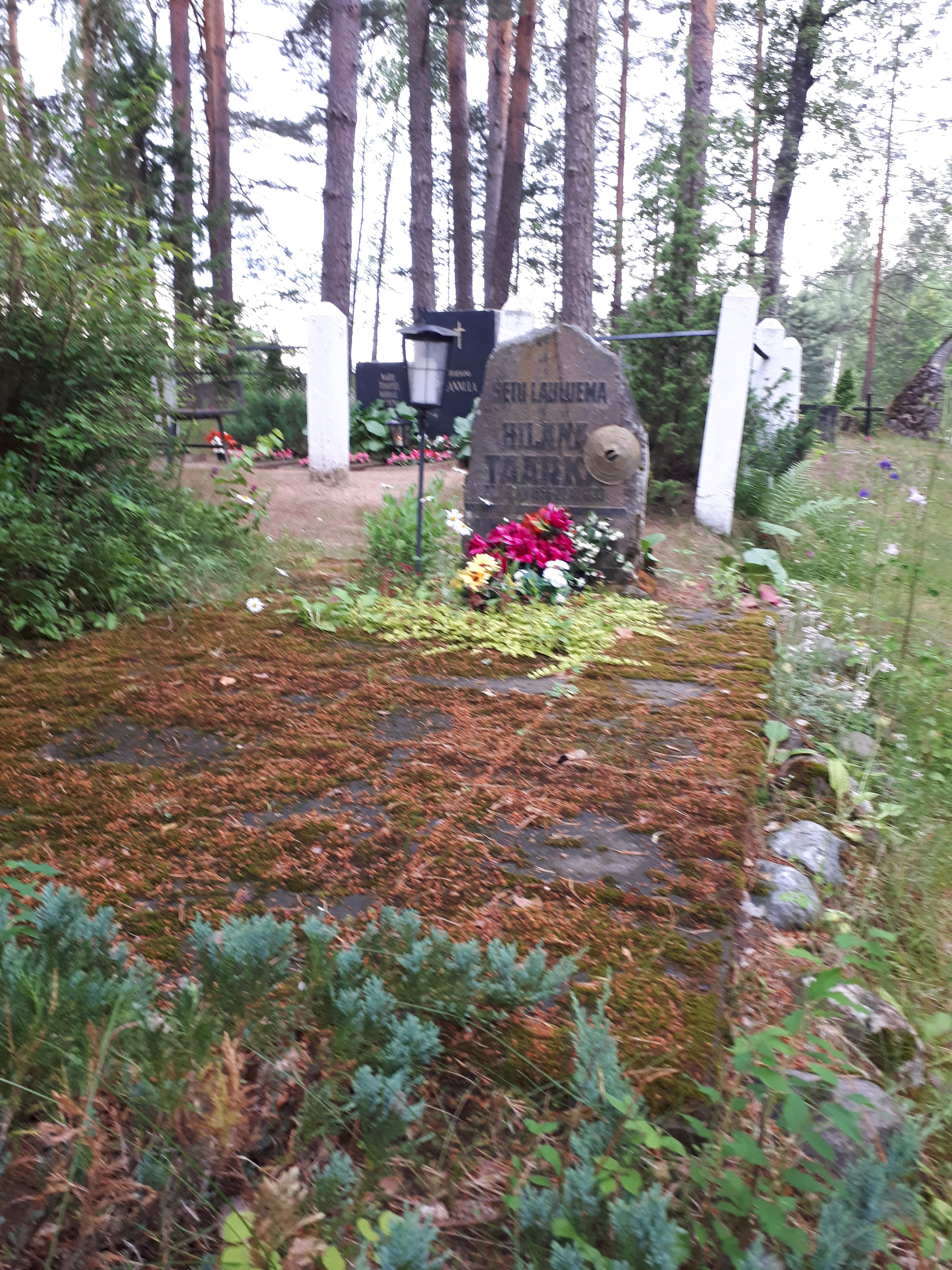 Grób poetki setuskiej Hilany Taarki, cmentarz w Obinitsa, Estonia.